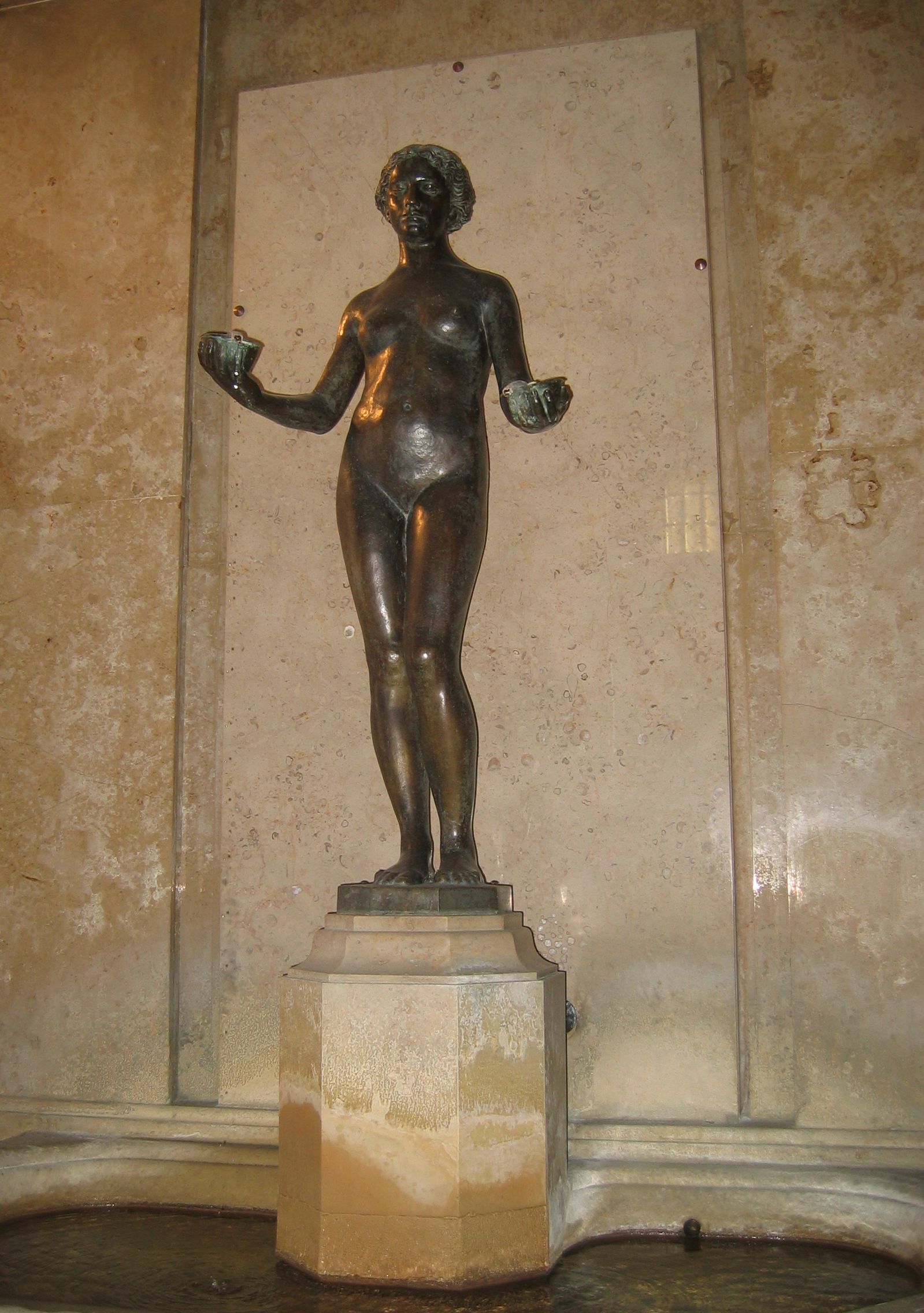 Brunnenfigur von Hermann Föry (1879-1930) im Foyer des Kieler Rathauses. Nymphe, Bronze (1911)